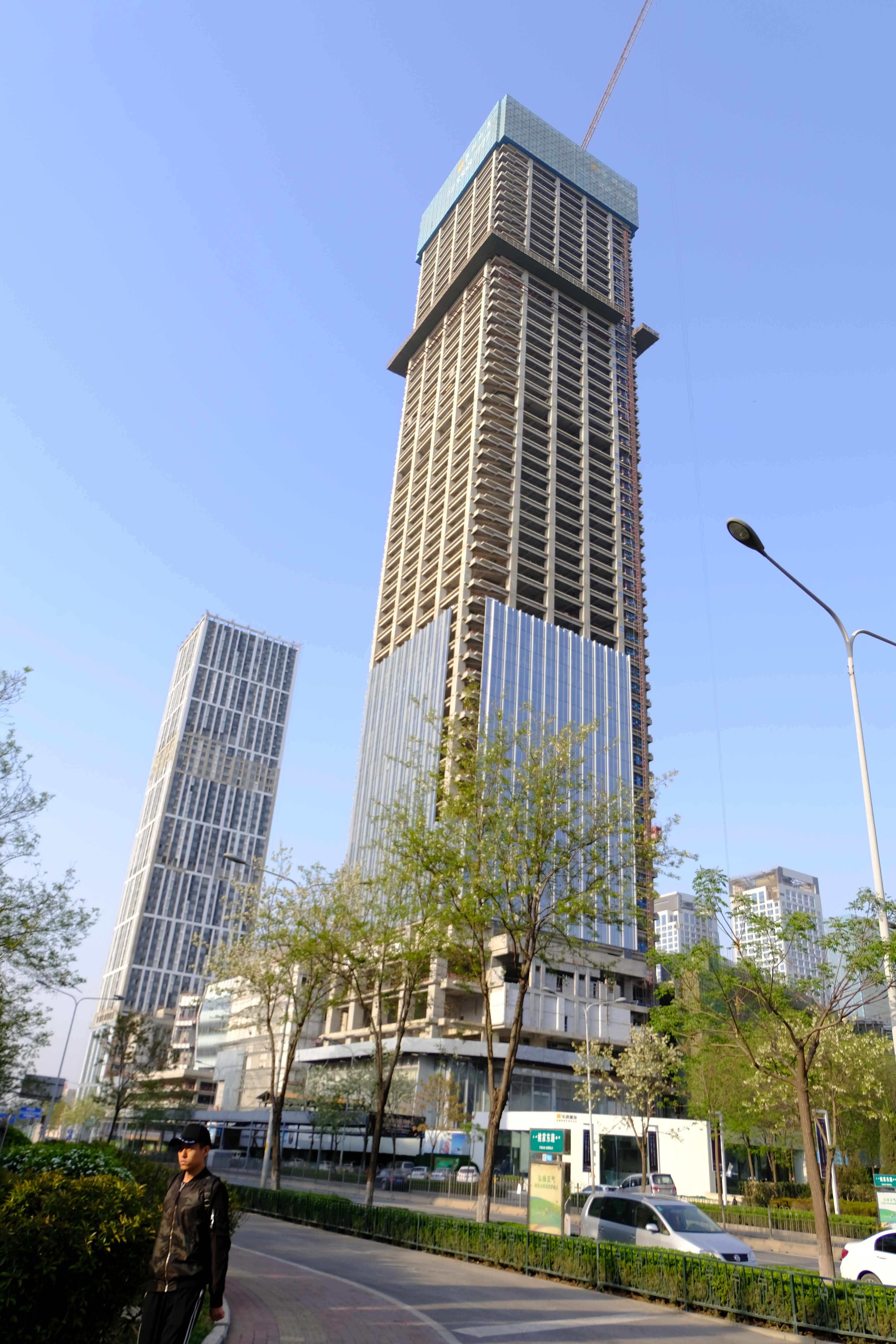 中文（中国大陆）: 济南华润大厦